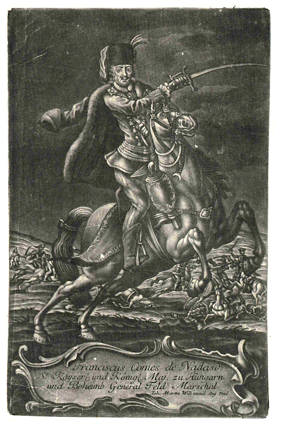 Nádasdy-Nádasd-Fogáras, Franz Graf (1708 - 1783)